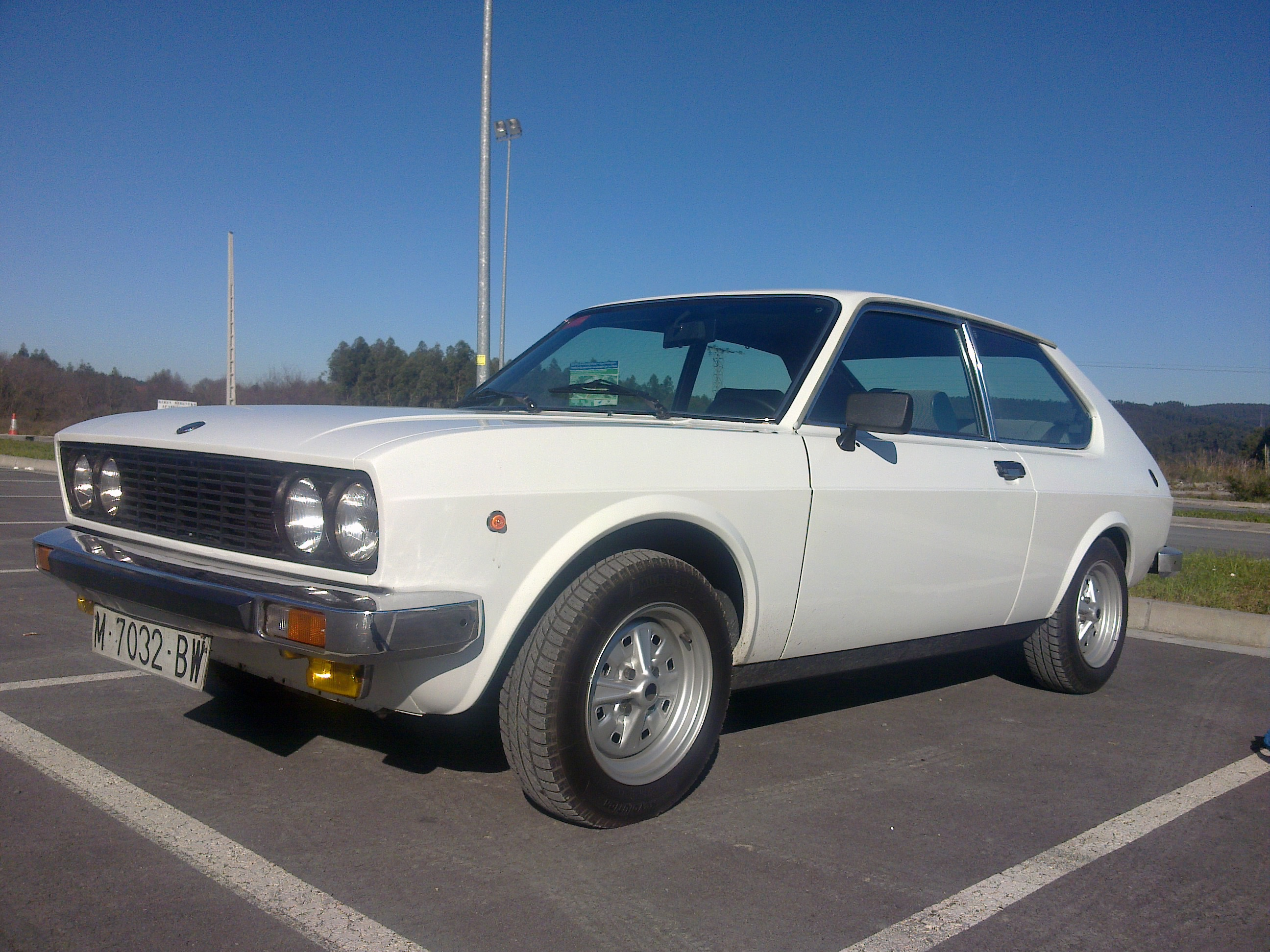 Leioako kanpusean ateratako argazkia.